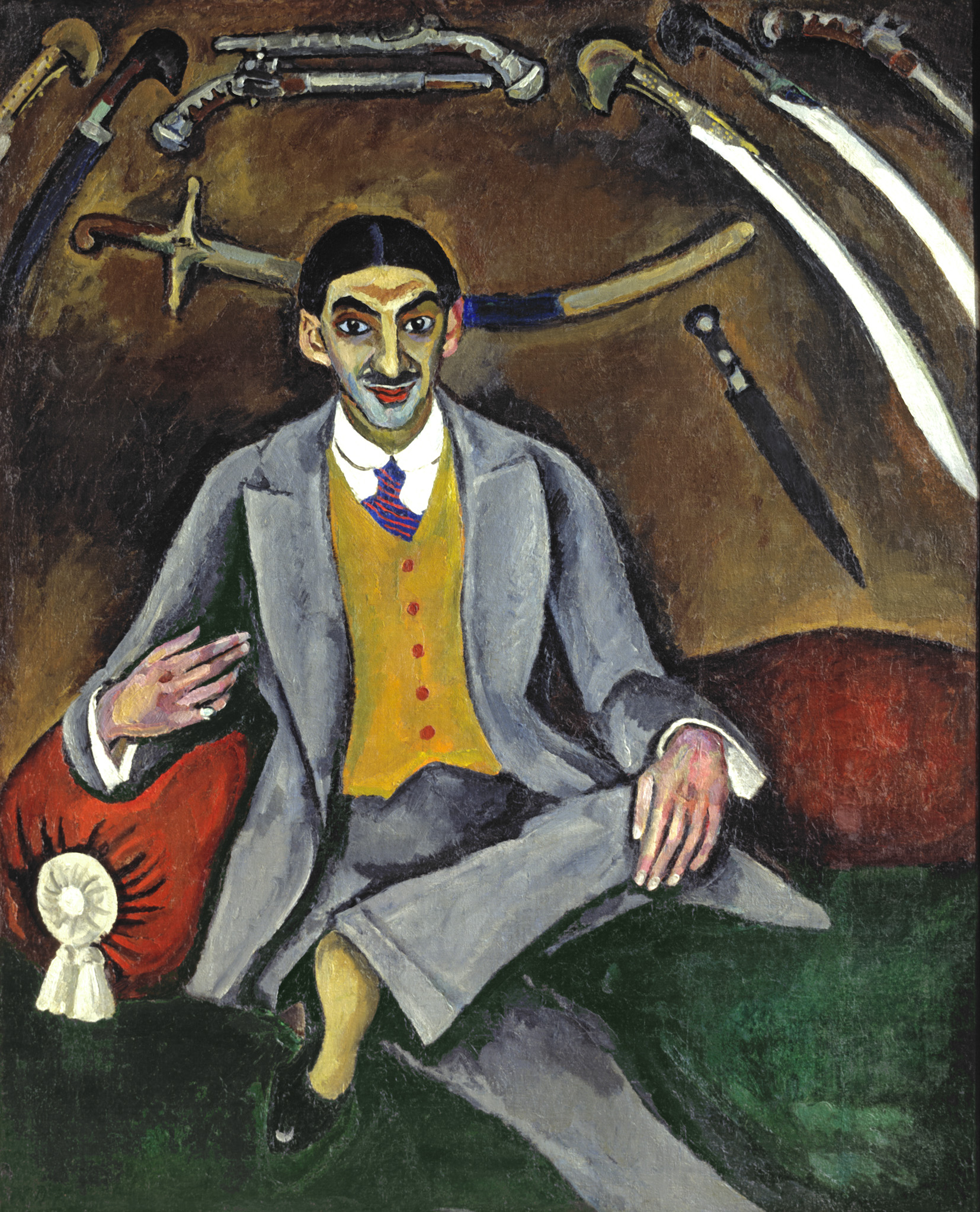 Пётр Кончаловский. Портрет Г. Б. Якулова. 1910 г. Государственная Третьяковская галерея, Москва.